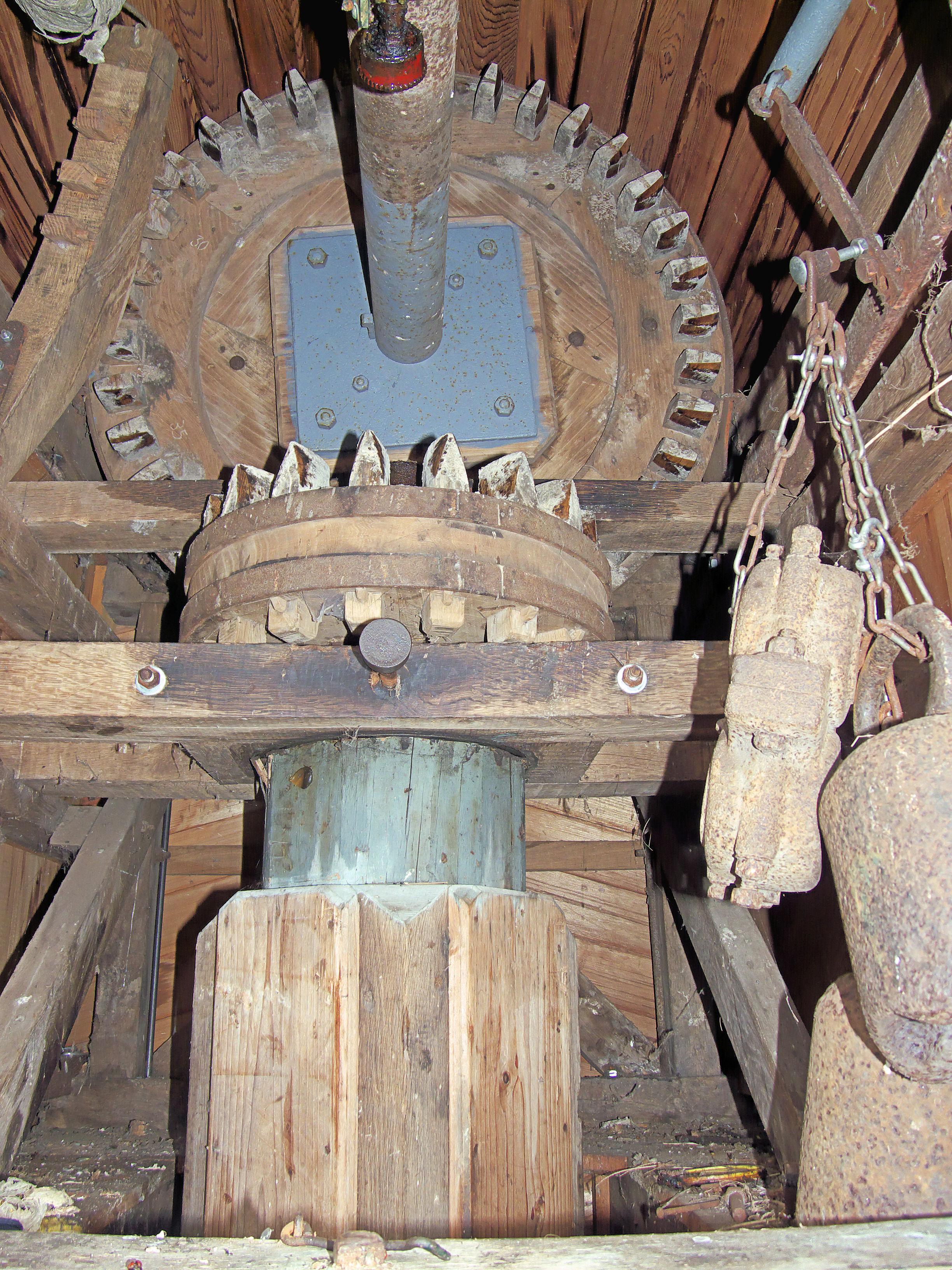 Spinnenkopmolen Wedderveer, binnenkant kop